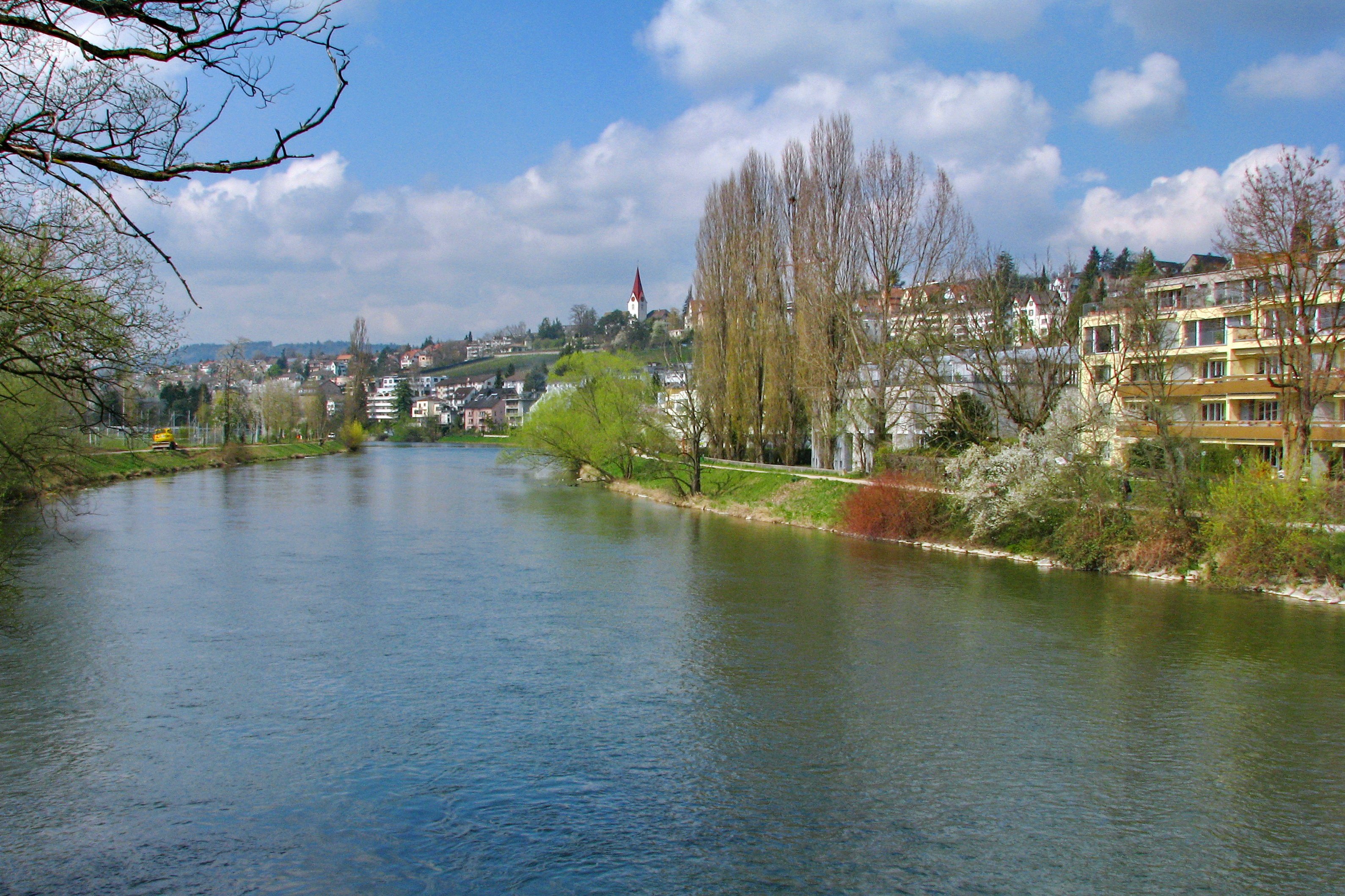 Limmat in Zürich-Wipkingen, Höngg in the background.